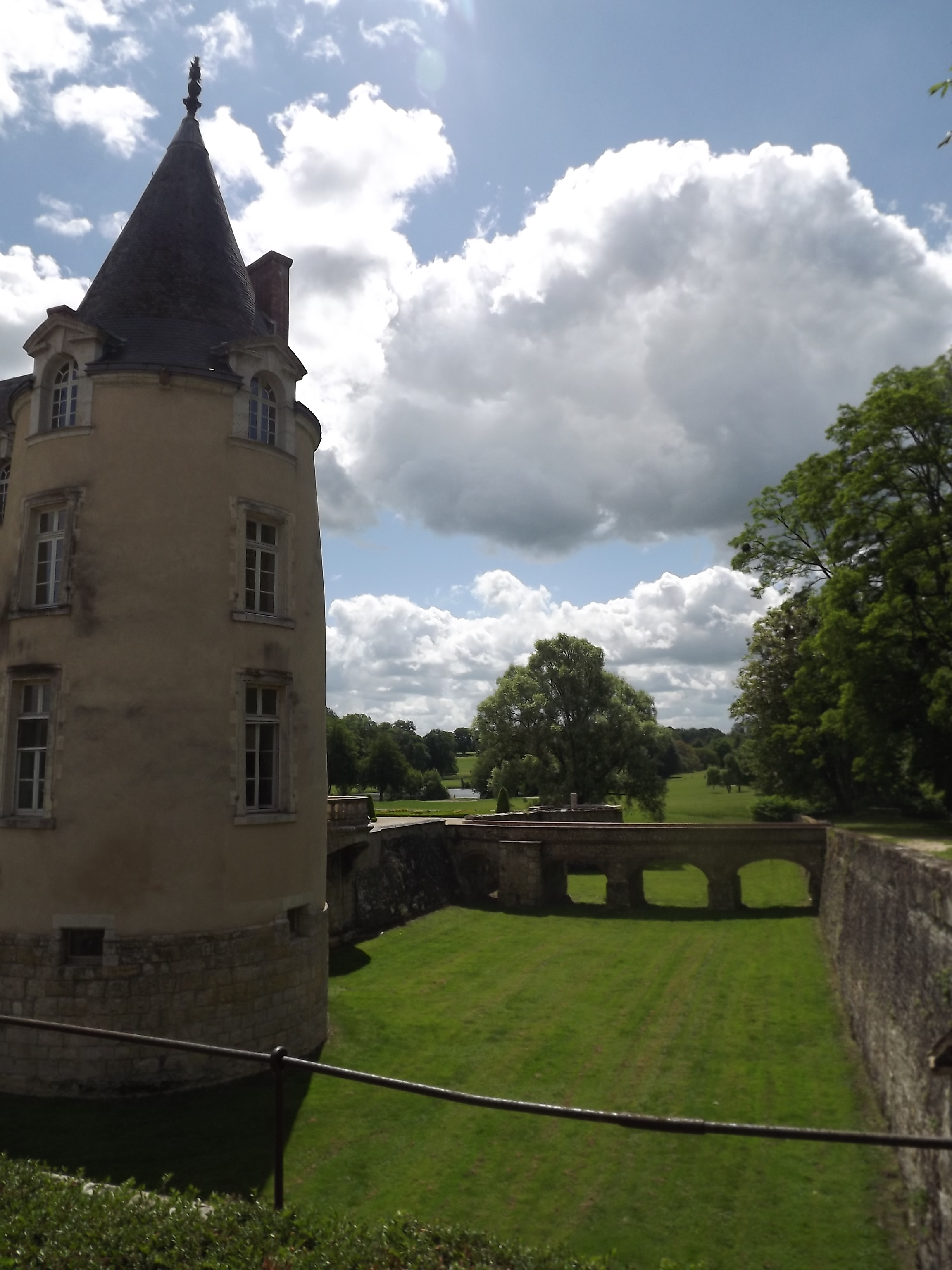 Tour gauche du château et vue des douves (vides)